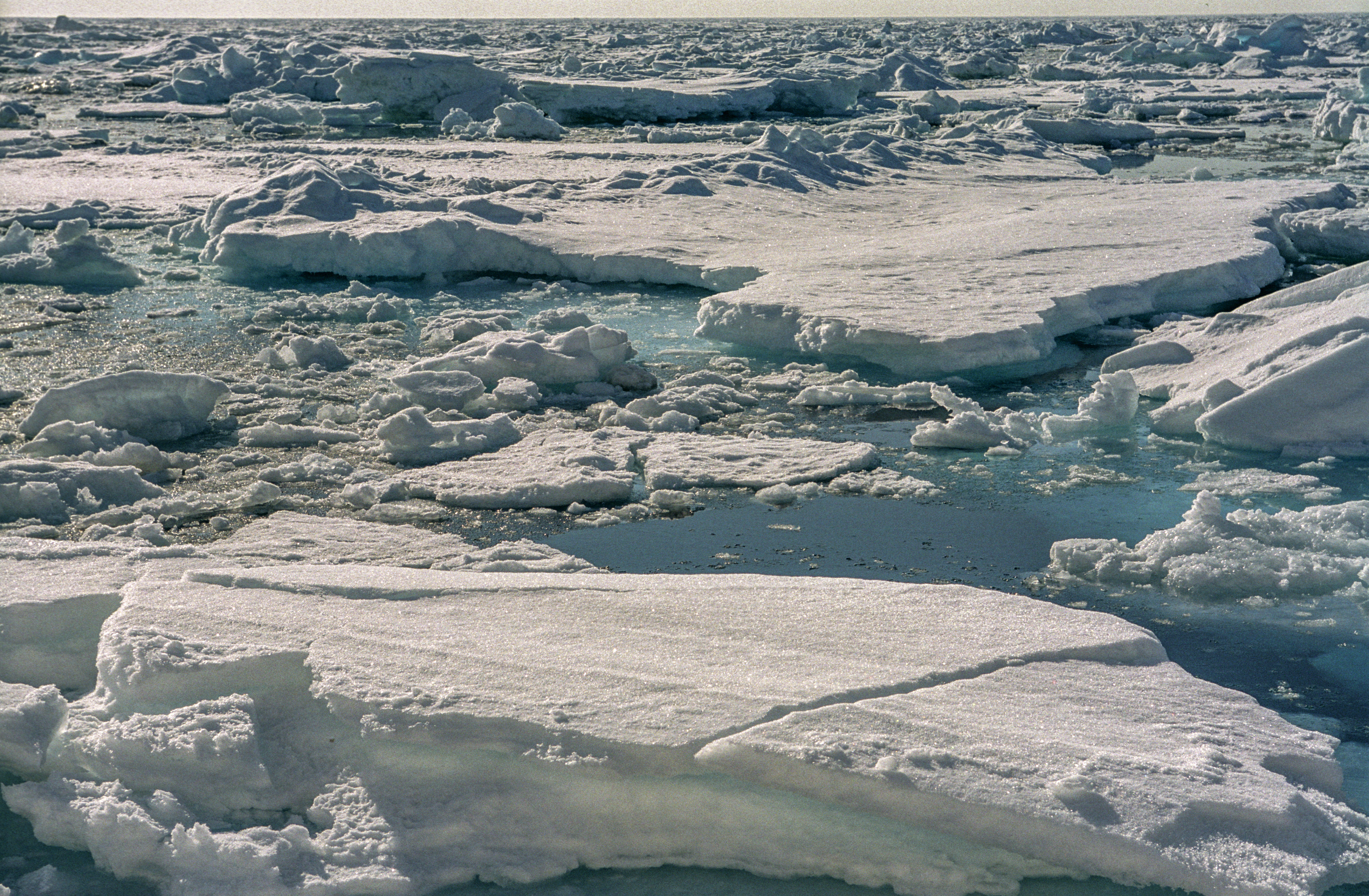 en/Svalbard, ice floe